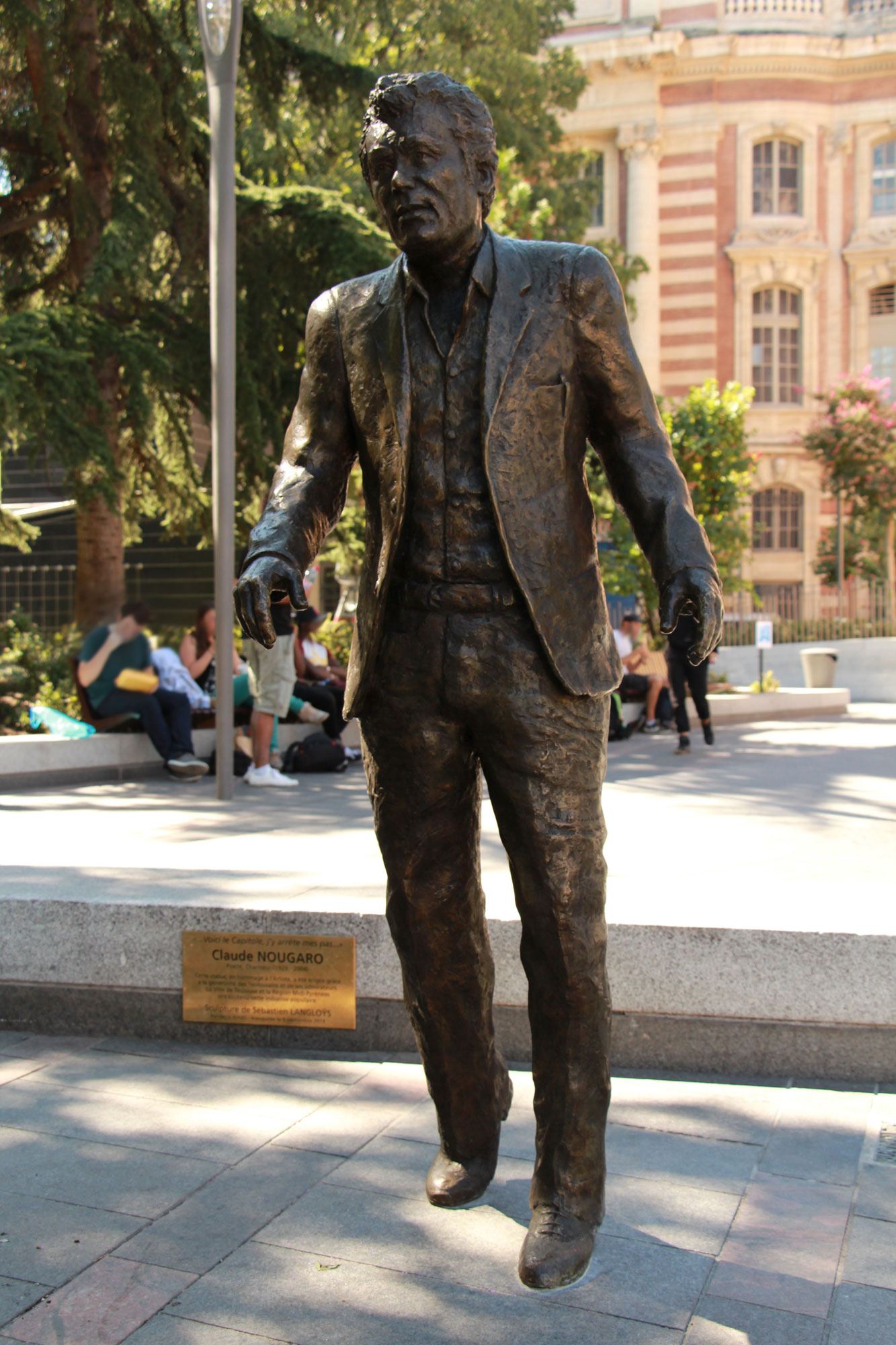 Statue de Claude Nougaro, Square Charles-de-Gaulle à Toulouse, 2014